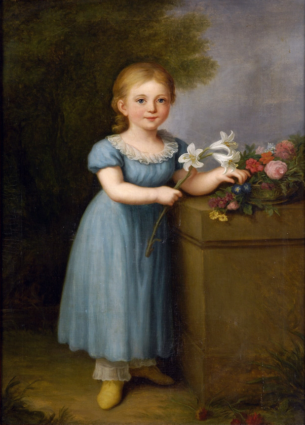 Portrait eines Mädchens im Schlosspark